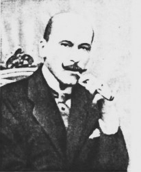 Henryk Weyssenhoff (1859-1922)- malarz